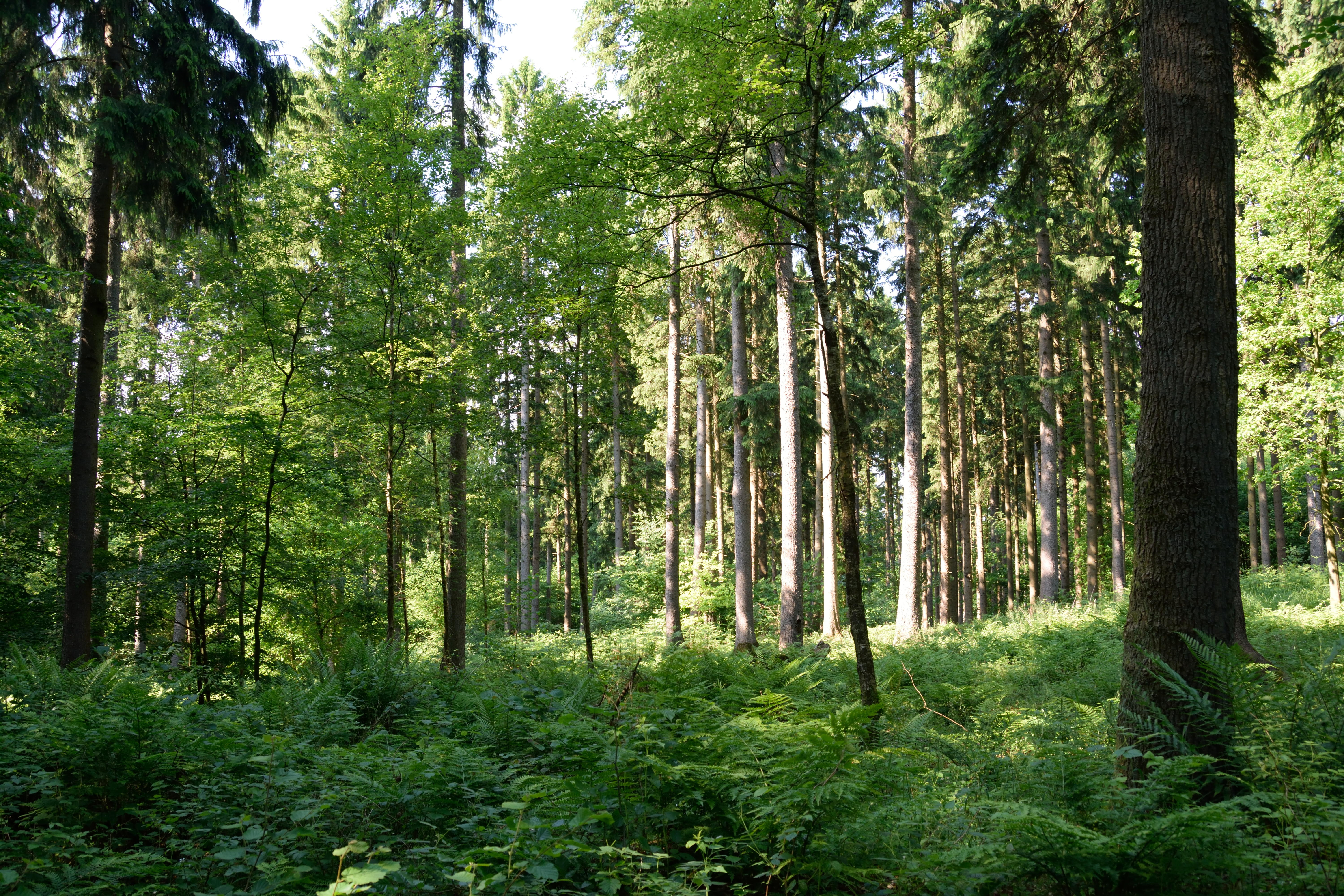 Der Kreis Steinburg hat mehrere Flächen unter dem gemeinsamen Namen " Landschaftsbestandteile und Landschaftsteile im Bereich mehrerer Gemeinden" zusammengefasst. Dieses Foto wurde im "Eichenwald Nordoe" aufgenommen, es ist das Teilstück Nr. 13.